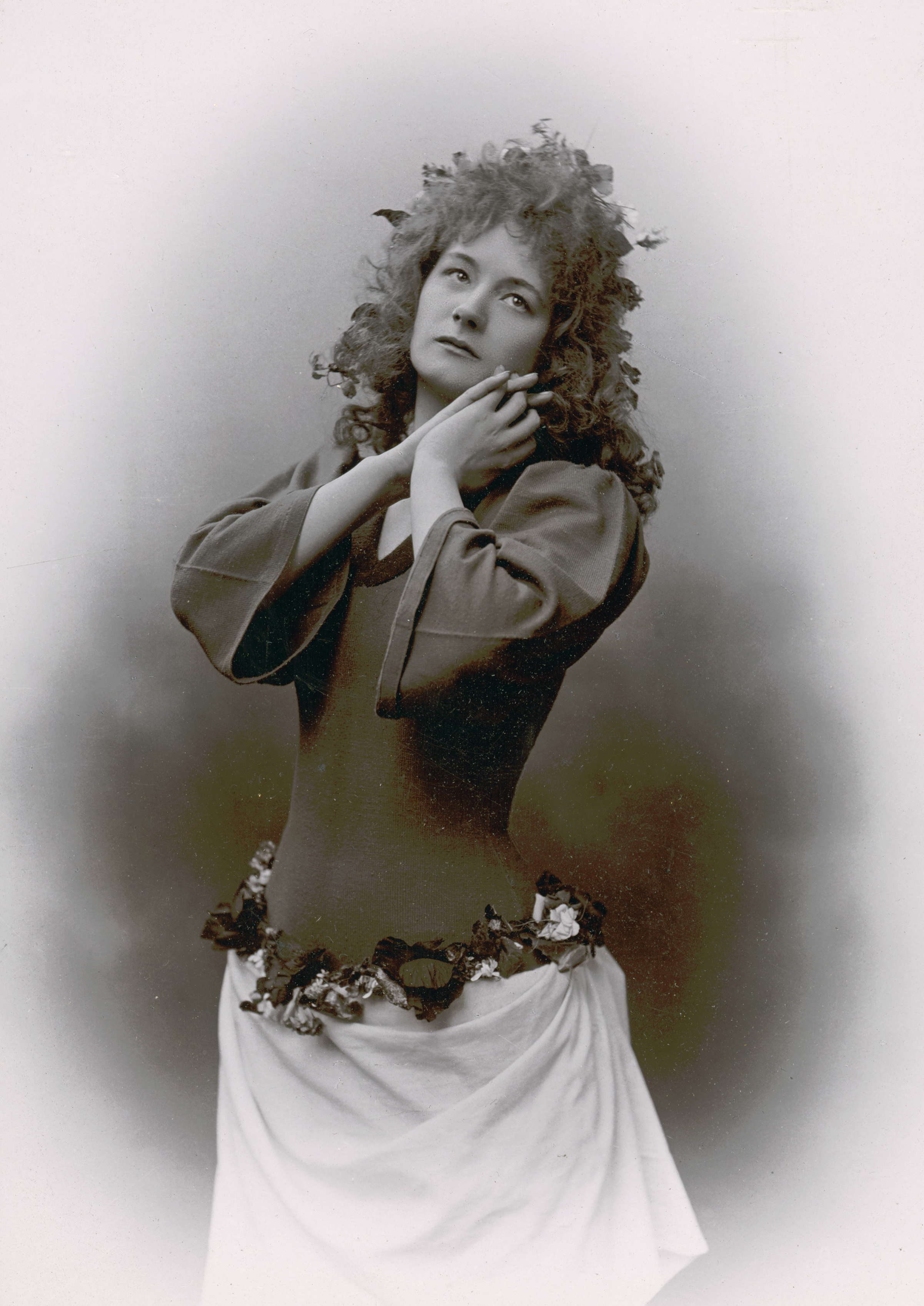 Constance Gottschalk som Perdita i En vintersaga, Vasateatern 1896